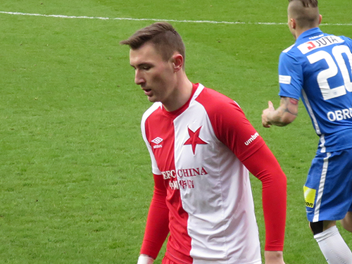 Jaromír Zmrhal